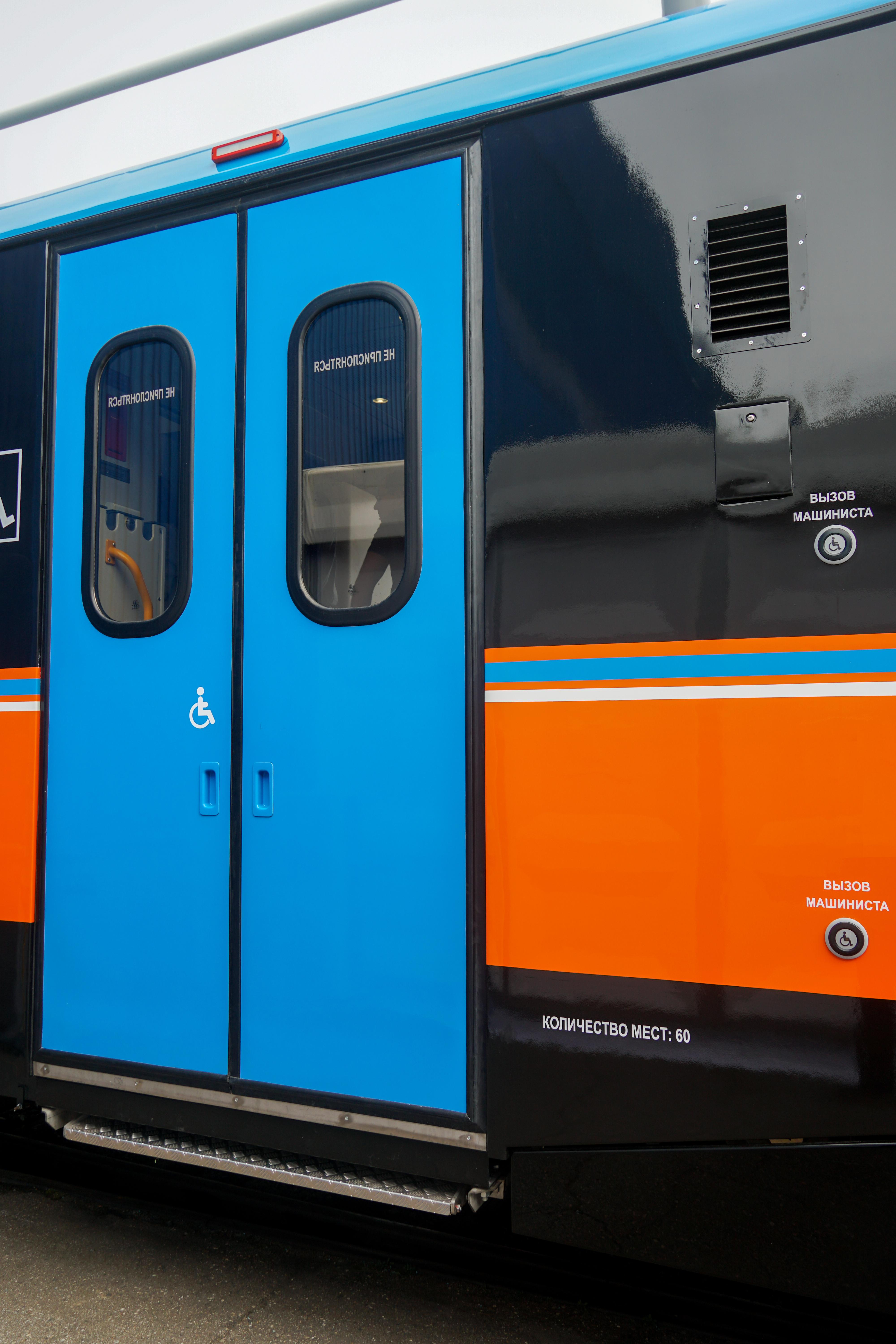 Пассажирские двери и дверные кнопки головного вагона рельсового автобуса (дизель-поезда) РА3-005